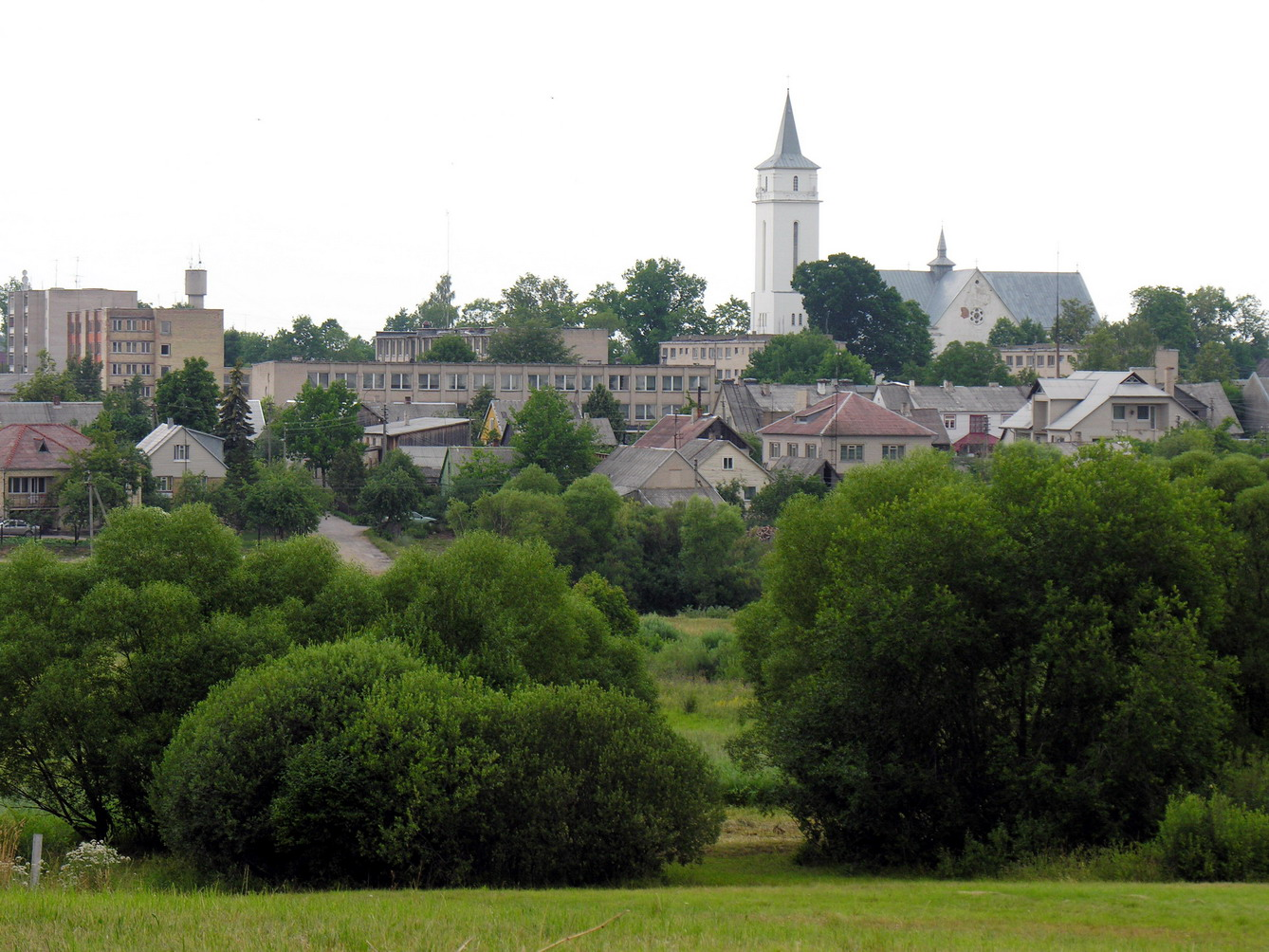 La ciudad Viekšniai en Lituania